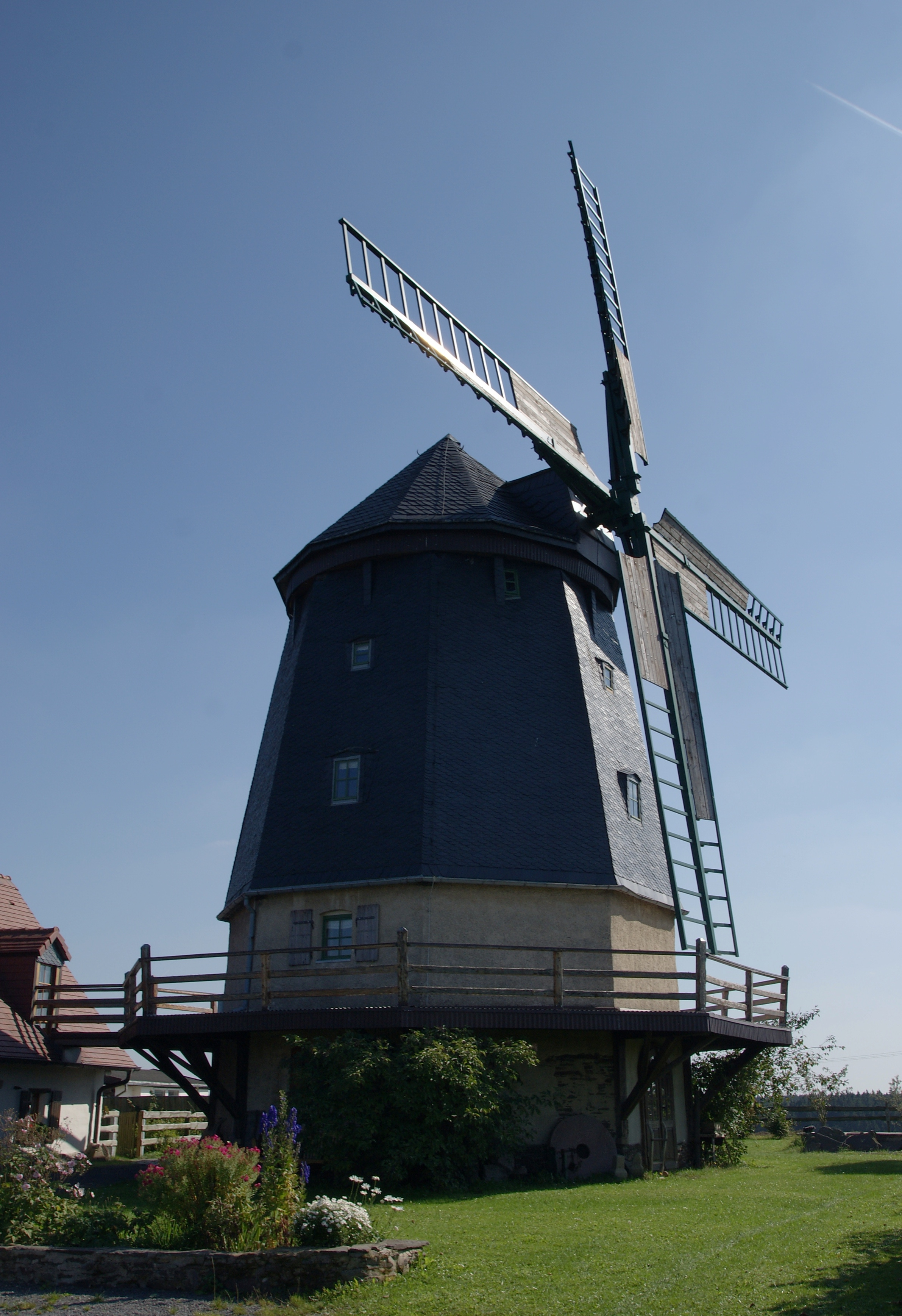 Windmühle Linda